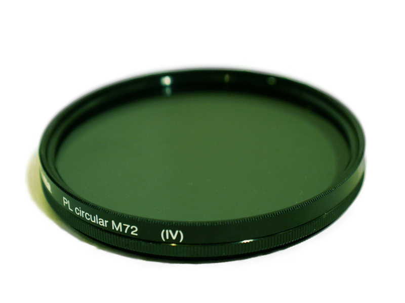 Polarisatiefilter